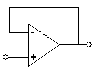 Spannungsfolger / Impedanzwandler mit einem OP